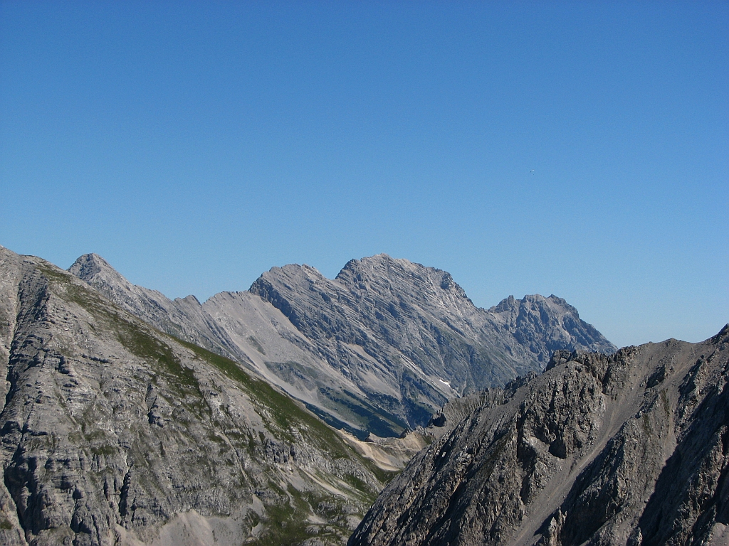 Die Bettelwürfe in der Gleirsch-Halltal-Kette